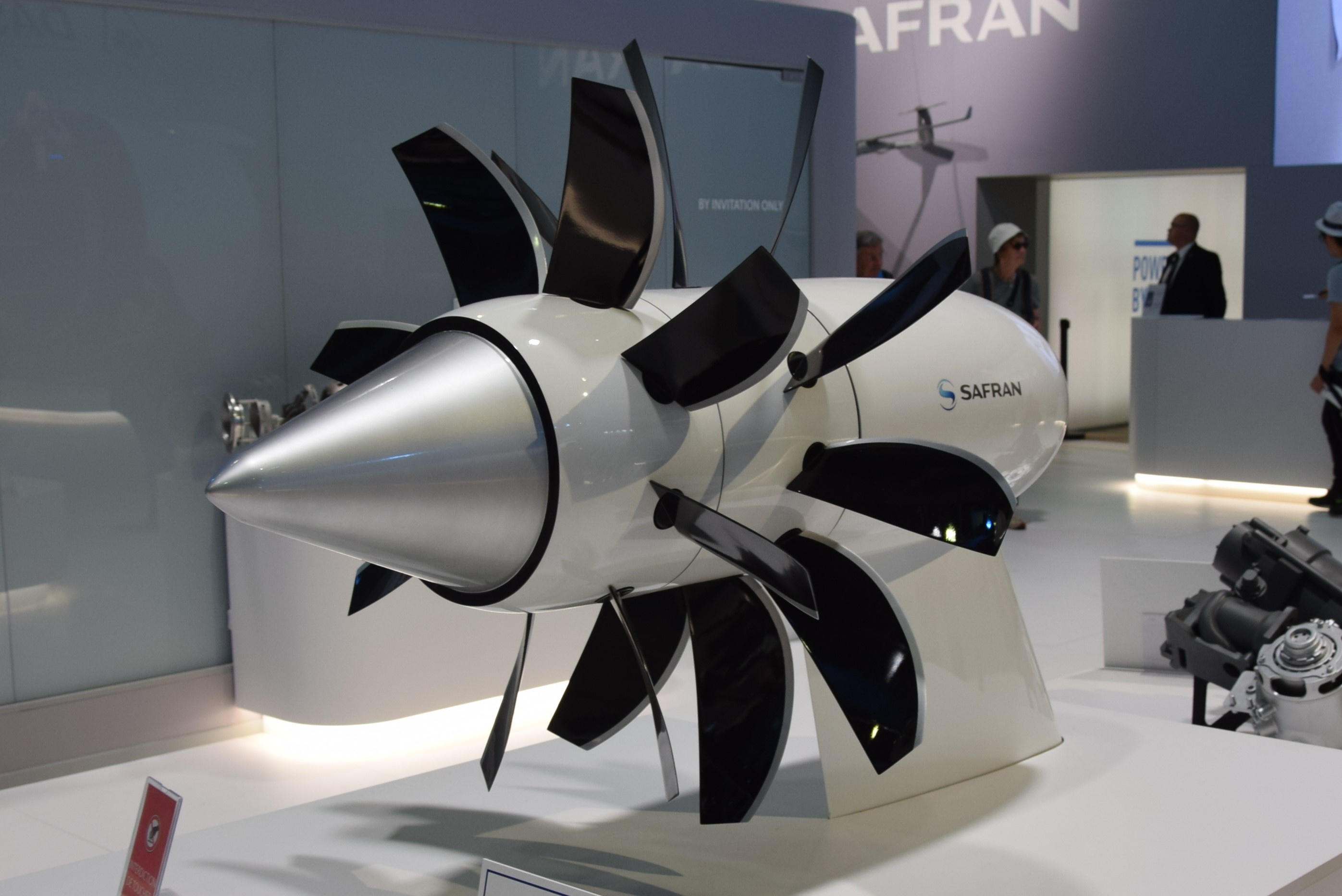 Soufflante non-carénée. Présenté au salon du Bourget 2017 au stand de Safran